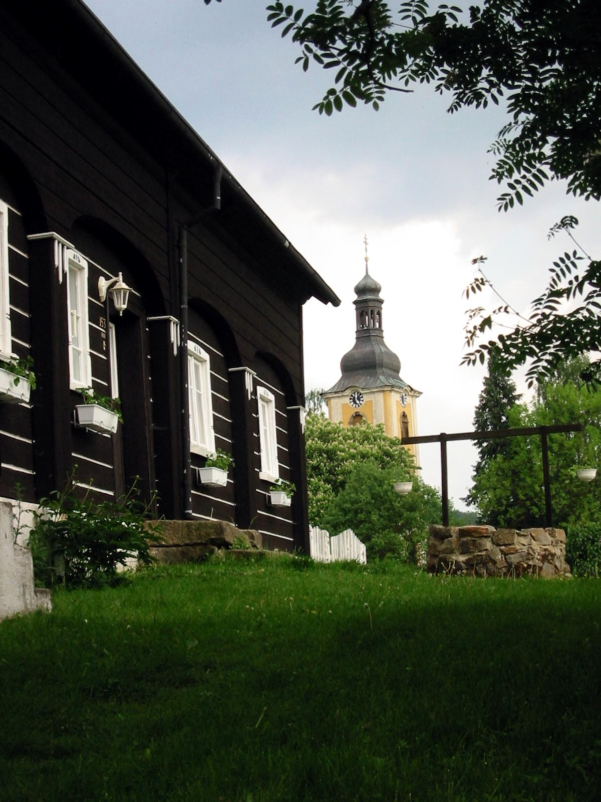 Doubice, okres Děčín - Kostel Nanebevzetí Panny Marie z let 1811 až 1814